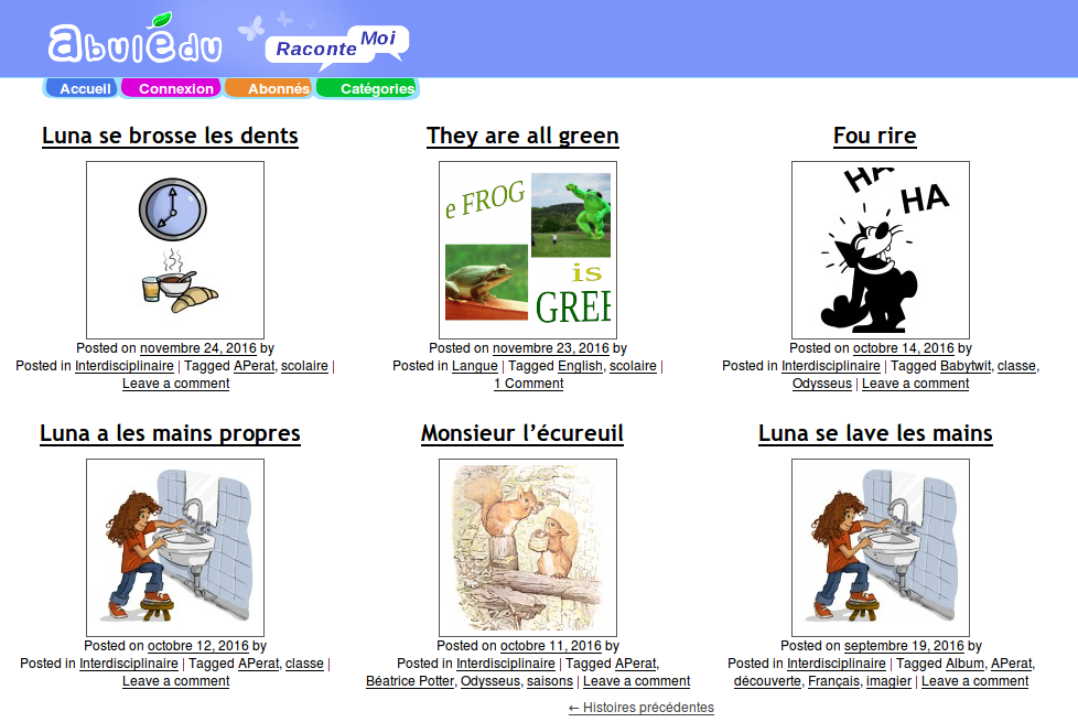 Enregistrements publiés sur la plate-forme web de raconte-moi.